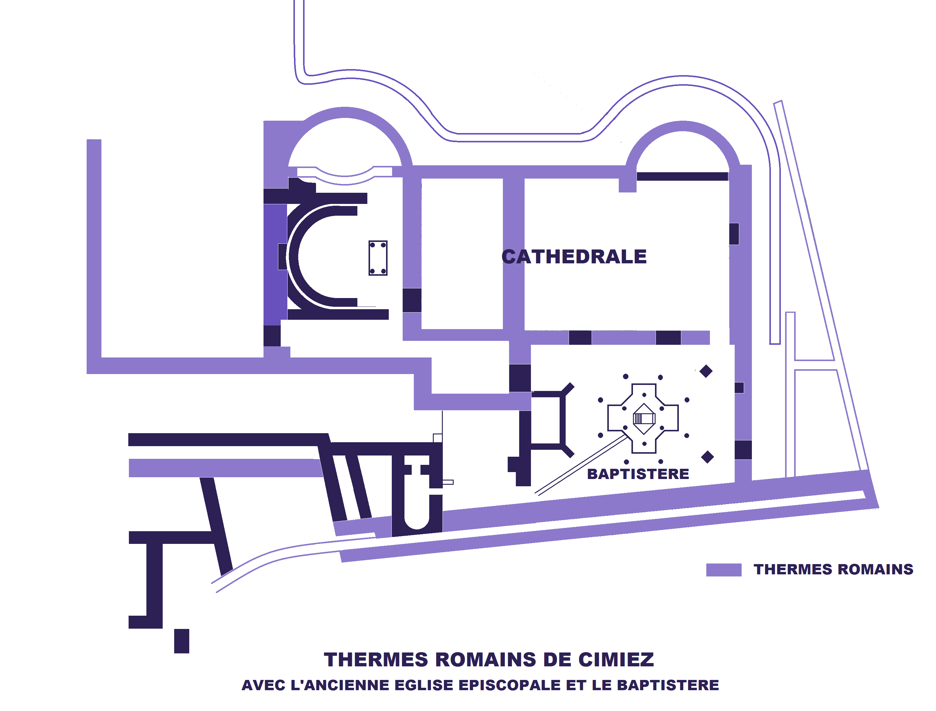 Cimiez, plan de l'église et du baptistère dans les thermes romains